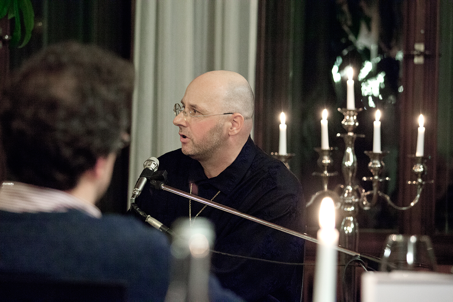 Daniel Oliver Bachmann. Schriftsteller, Drehbuchautor, Regisseur